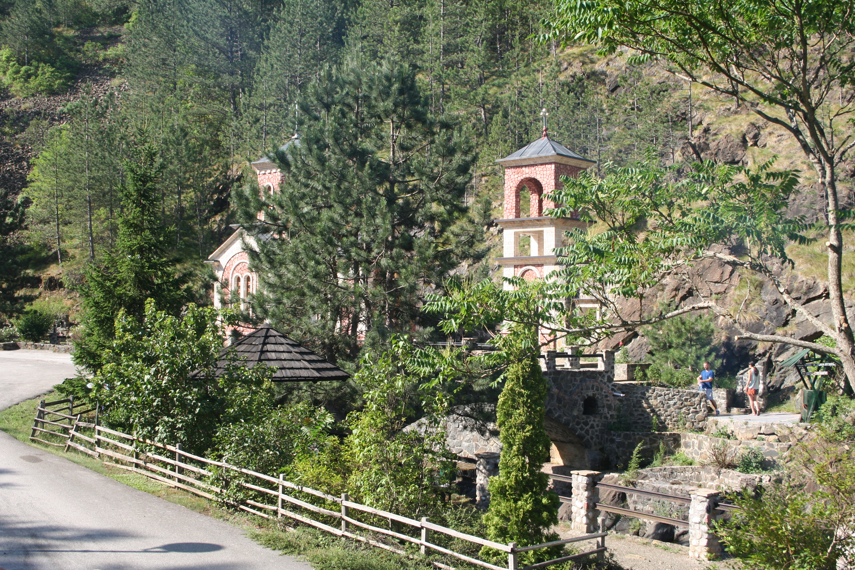 Izvor Bele Vode, Mokra Gora